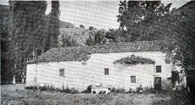 Църквата "Света Богородица" на Лешочкия манастир.